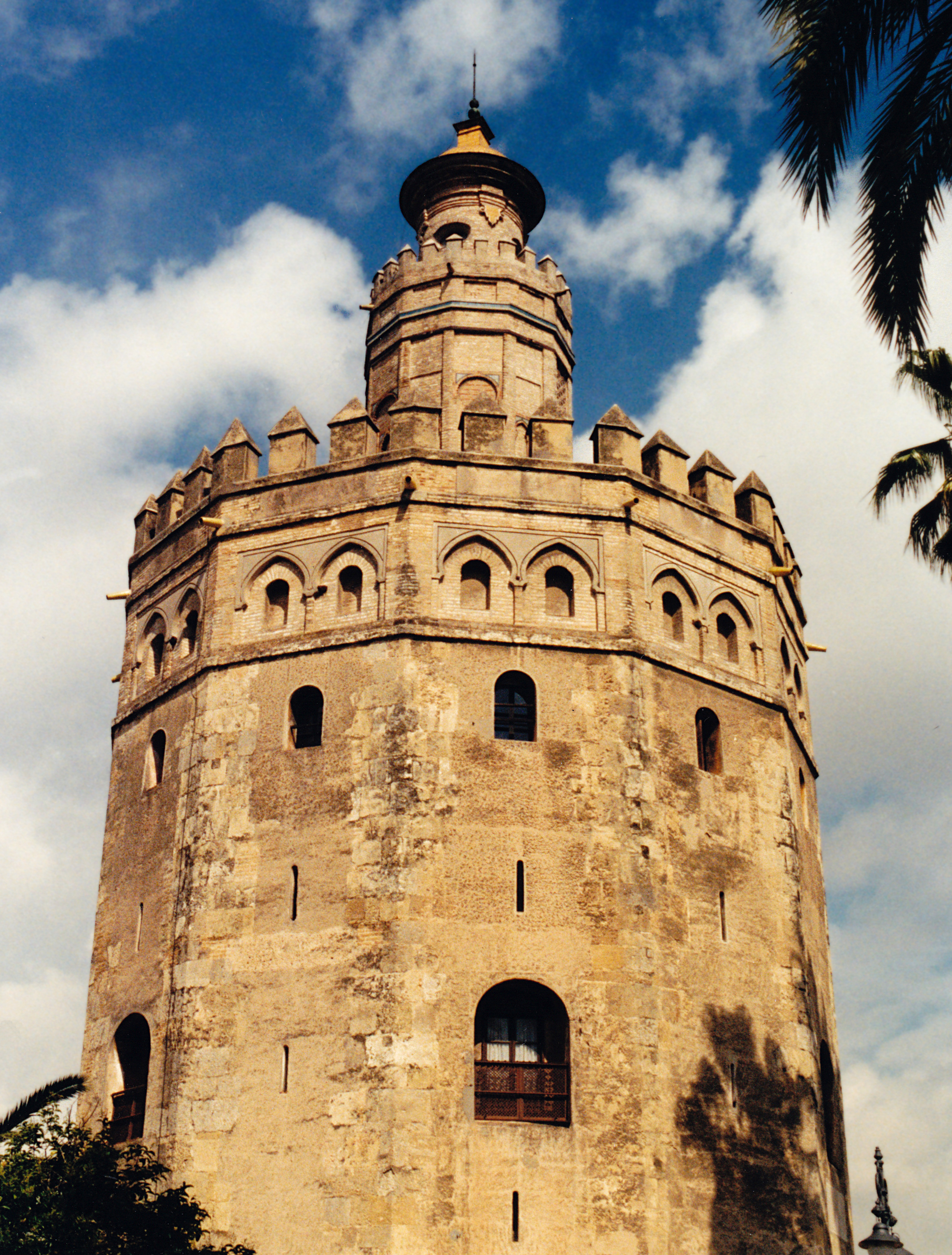 Séville - Torre del Oro - Tour almohade montrant des arcs outrepassés brisés